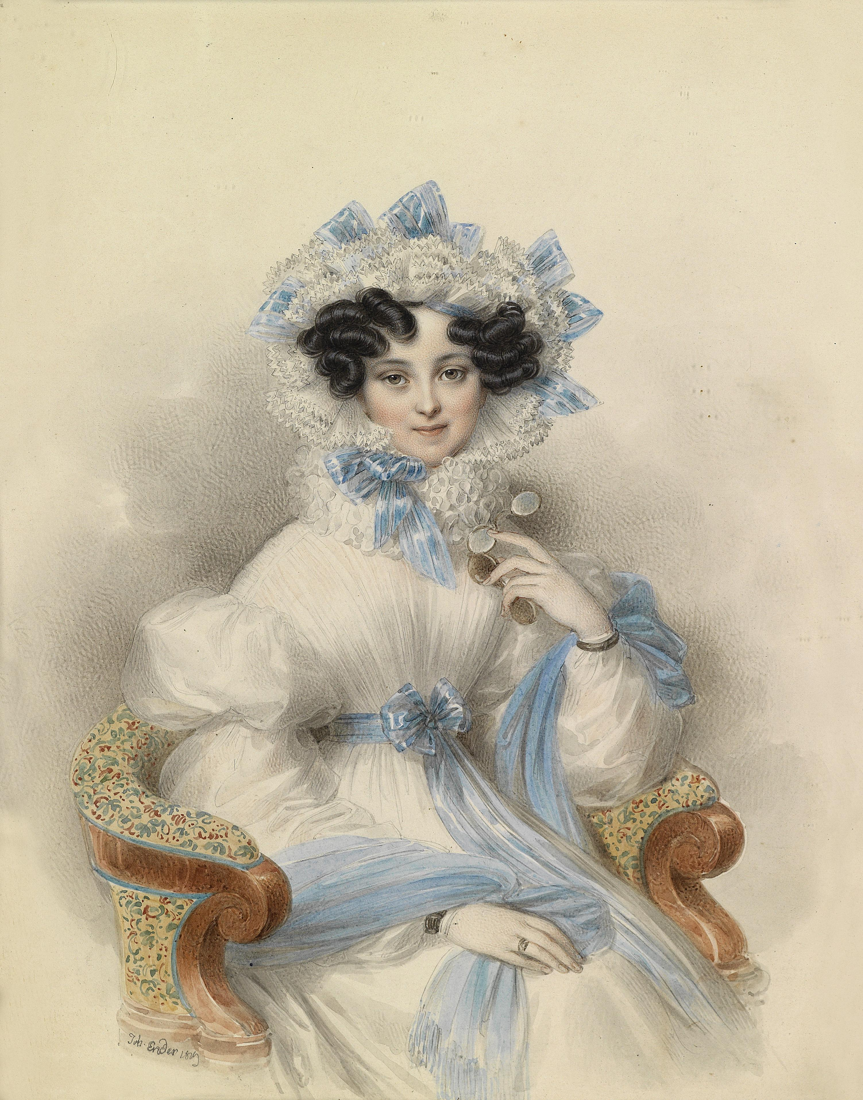 Bildnis der Erzherzogin Henriette von Österreich in weißem Kleid mit blauen Schleifen, in einem Lehnstuhl sitzend